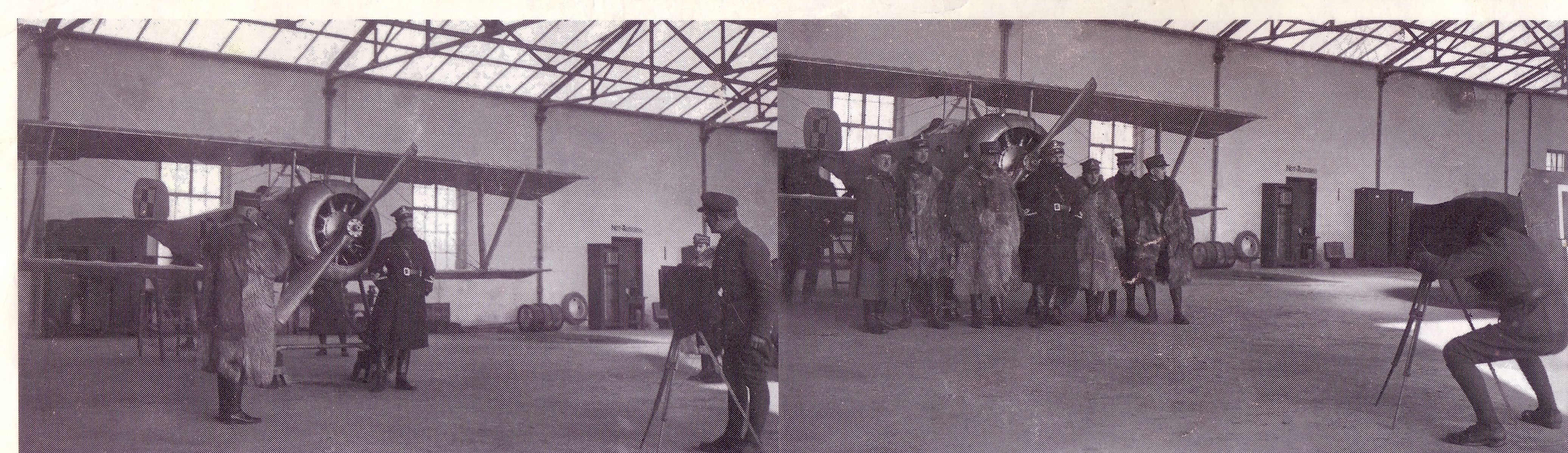 Как польская армия разбила истребитель Ньюпор-17: последовательные 4 кадра. Февраль 1920 года.